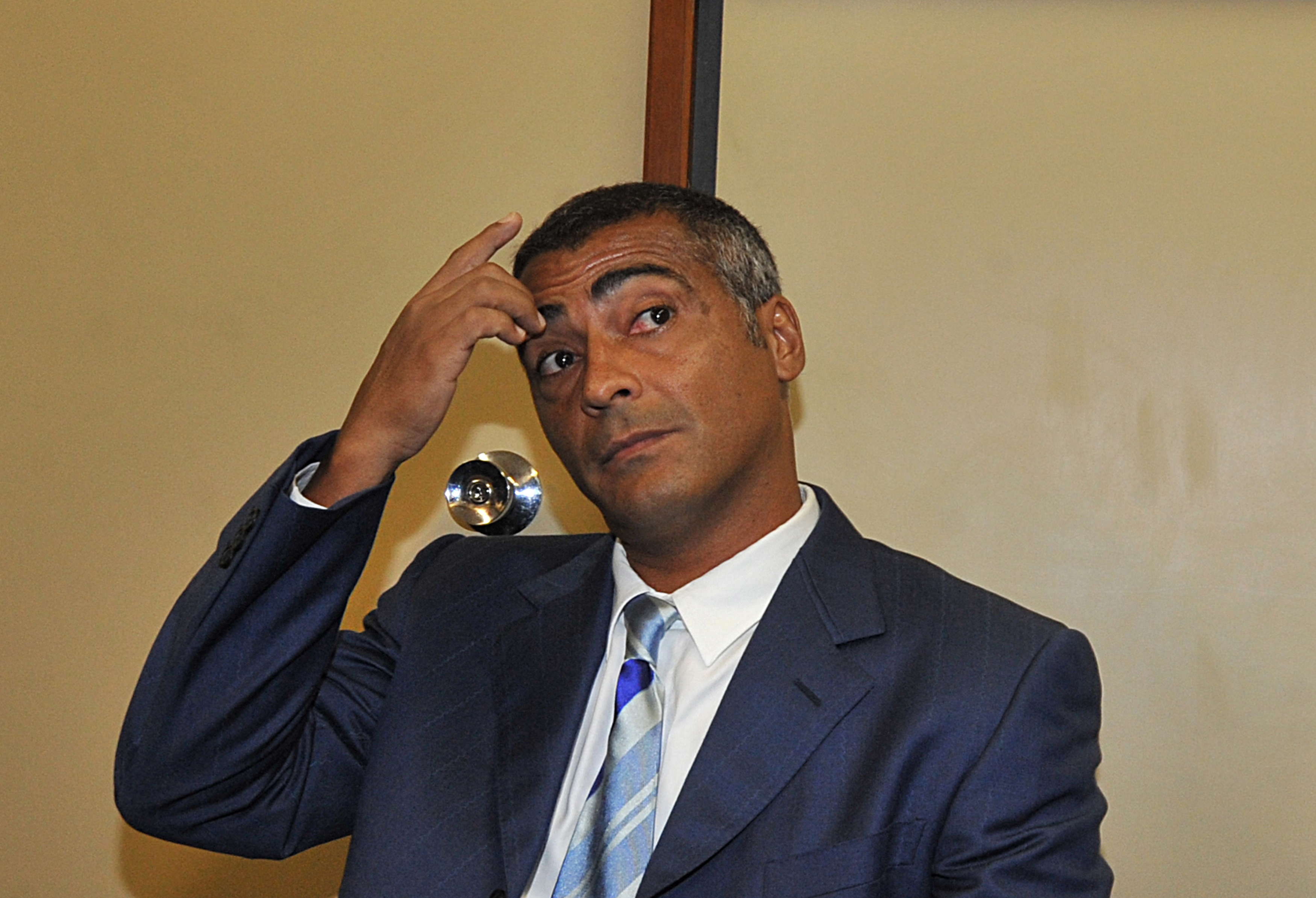 Brasília - O ex-jogador de futebol Romário visita a Câmara dos Deputados.